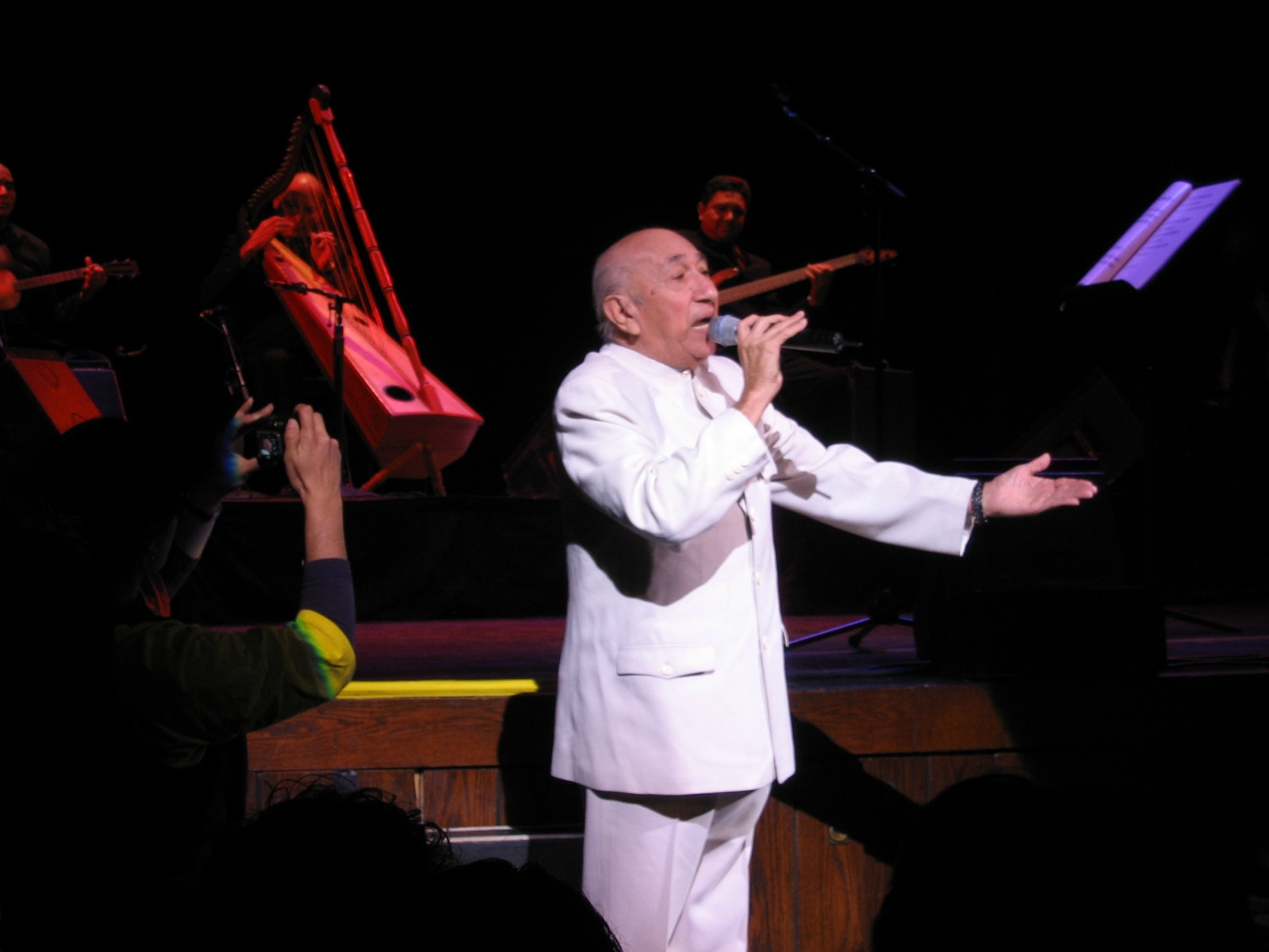 Cantautor venezolano Simón Díaz en Boston, 2005.